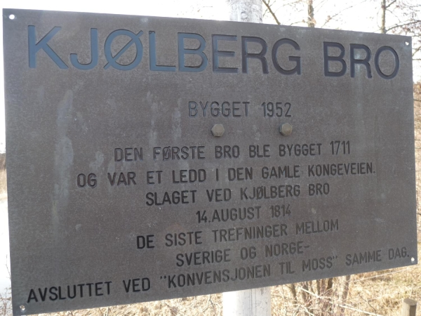 Minnes tavla över slaget vid Kjölbergs 14 augusti 1814. Vid Kjölbergs bro där slaget stod.